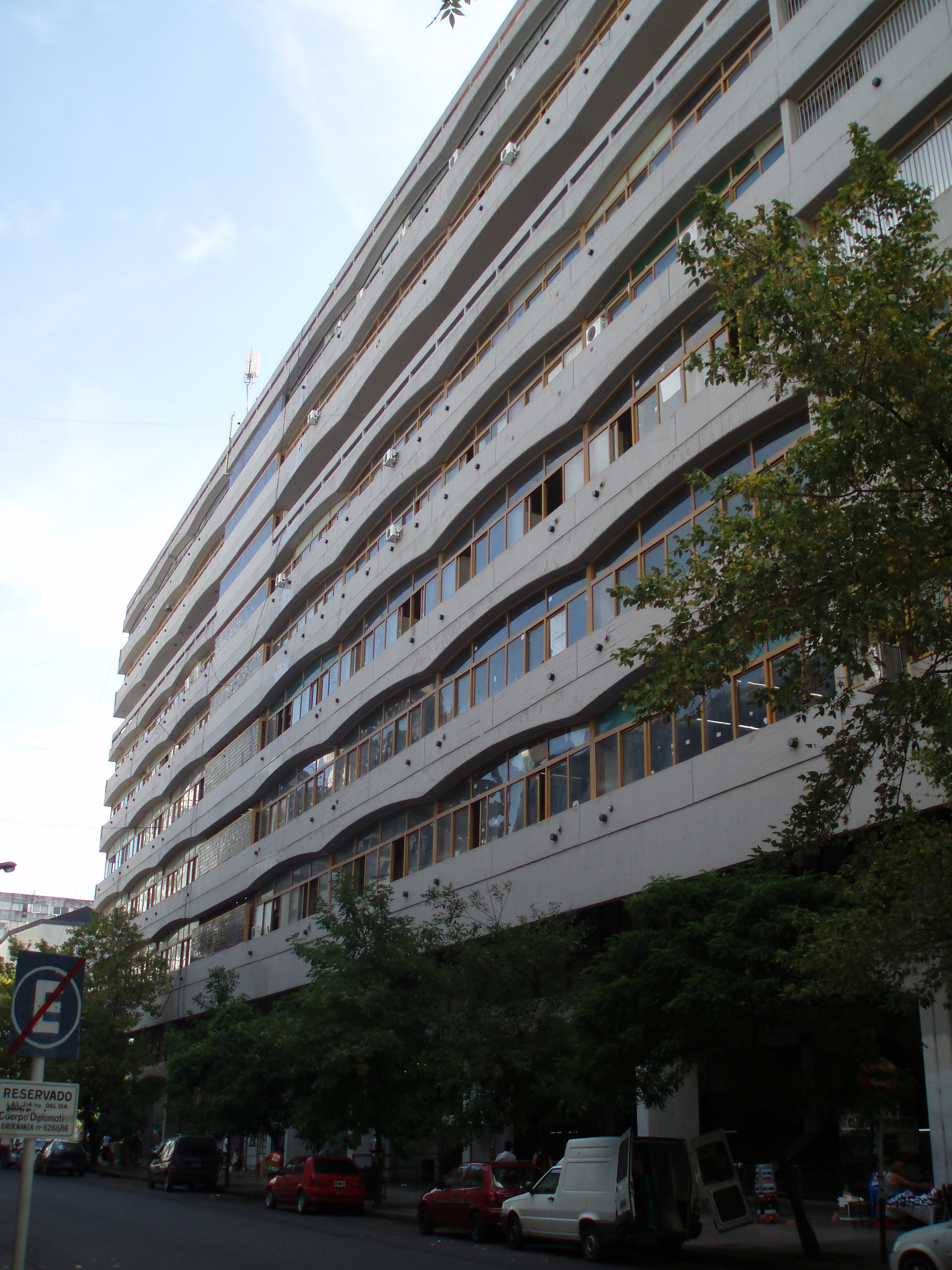 Fachada sobre calle 48 del Edificio Tres Facultades, de la Universidad Nacional de La Plata (Argentina).